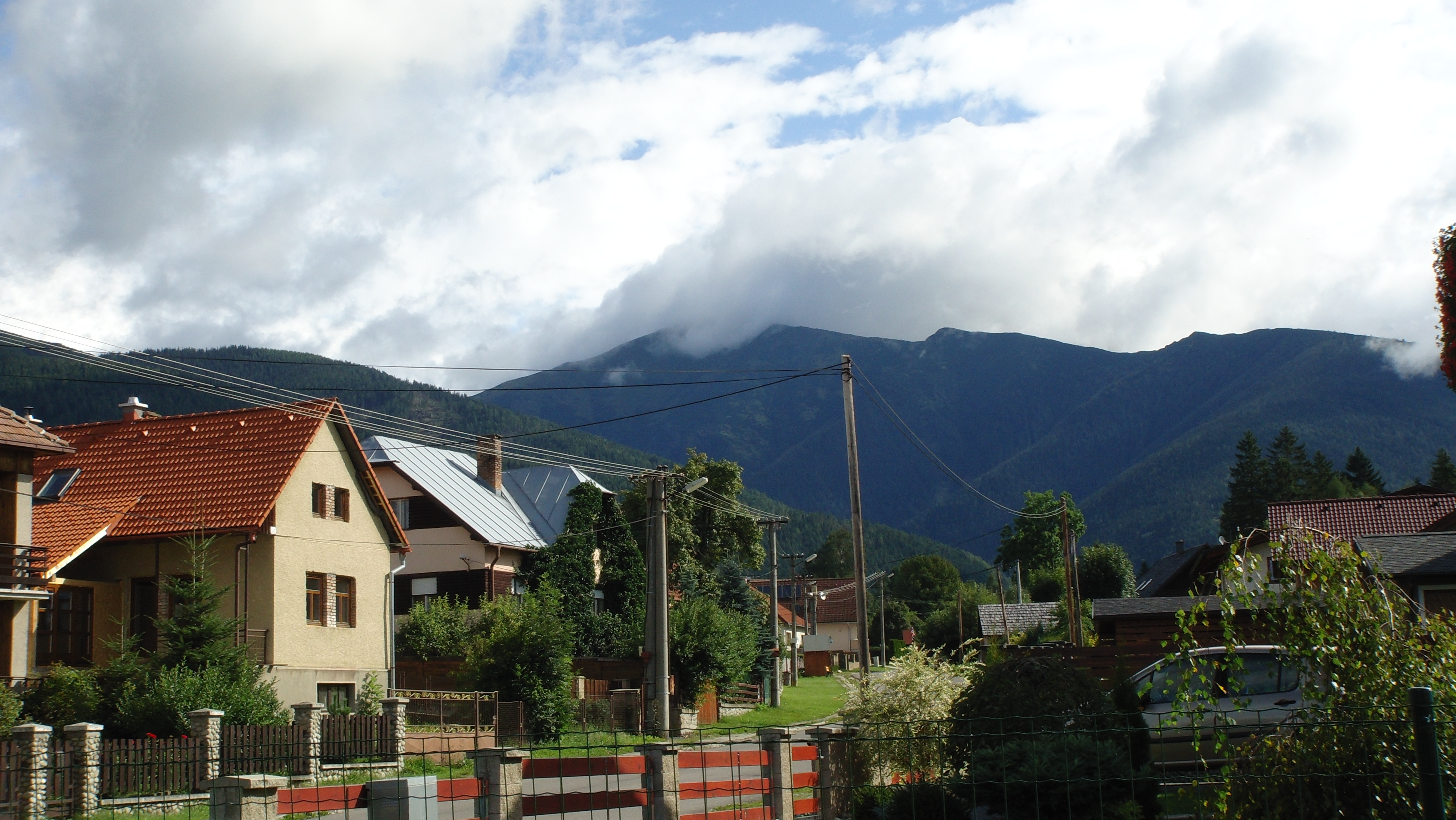 Żar (powiat Liptowski Mikułasz)